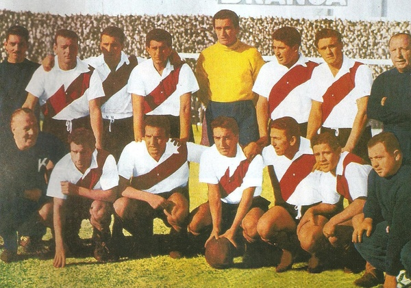 River campeón de 1957. Arriba: Alfredo Pérez, Ramaciotti, Mantegari, Carrizo, Urriolabeitia y Vairo. Abajo: De Bourgoing, Prado, Menéndez, Labruna y Zárate.